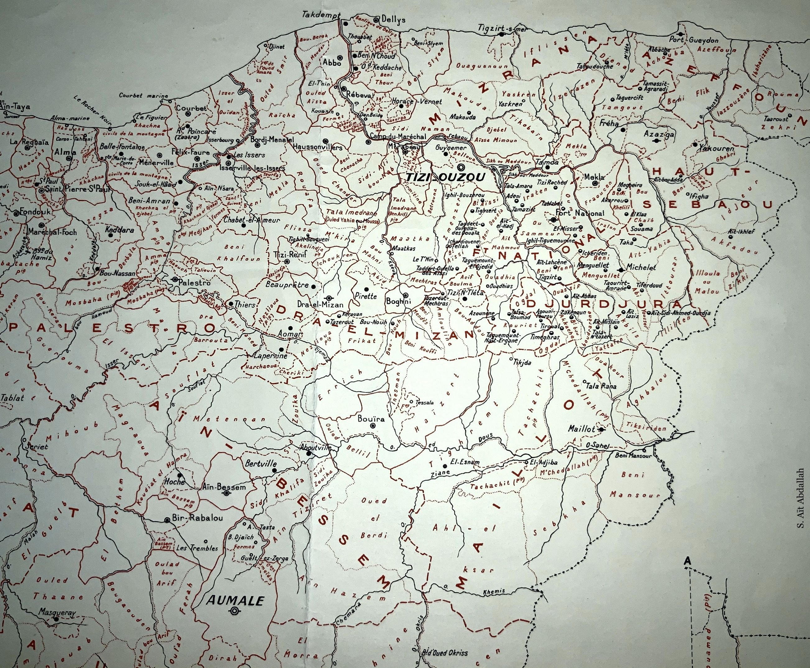 Cartographie de la confédération et des tribus de la Grande Kabylie (Tamawya Taqbaylit) - Algérie.